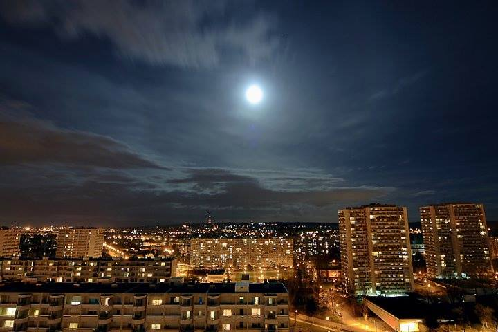 Quand le soleil se couche le quartier se réveille. Quartier des Coteaux, Mulhouse, France.